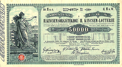 Sorsjegy a II. Kincsem-sorsjátékhoz 50000 Ft a főnyeremény, Egy sorsjegy 1 frt, 11 sorsjegy 1 0 ft Egy sorsjegy ára 1 frt. Egyetlen sorsjegy sem nyújthat több előnyt, mint a Kincsem-sorsjegyek, melyeknek 10000 és pedig egy 50000 frtos, egy 20000, egy 10000, továbbá több 5000, 3000, 2000, 1000 stb forintos nyereménye vannak és igazán hazafias intentiója van: a telivér-tenyésztés emelése Magyarországban.